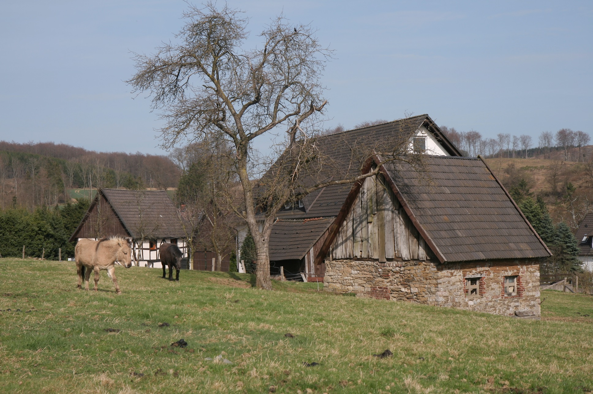 Hof in Balve-Langenholthausen, Bornstraße/Mittelweg.